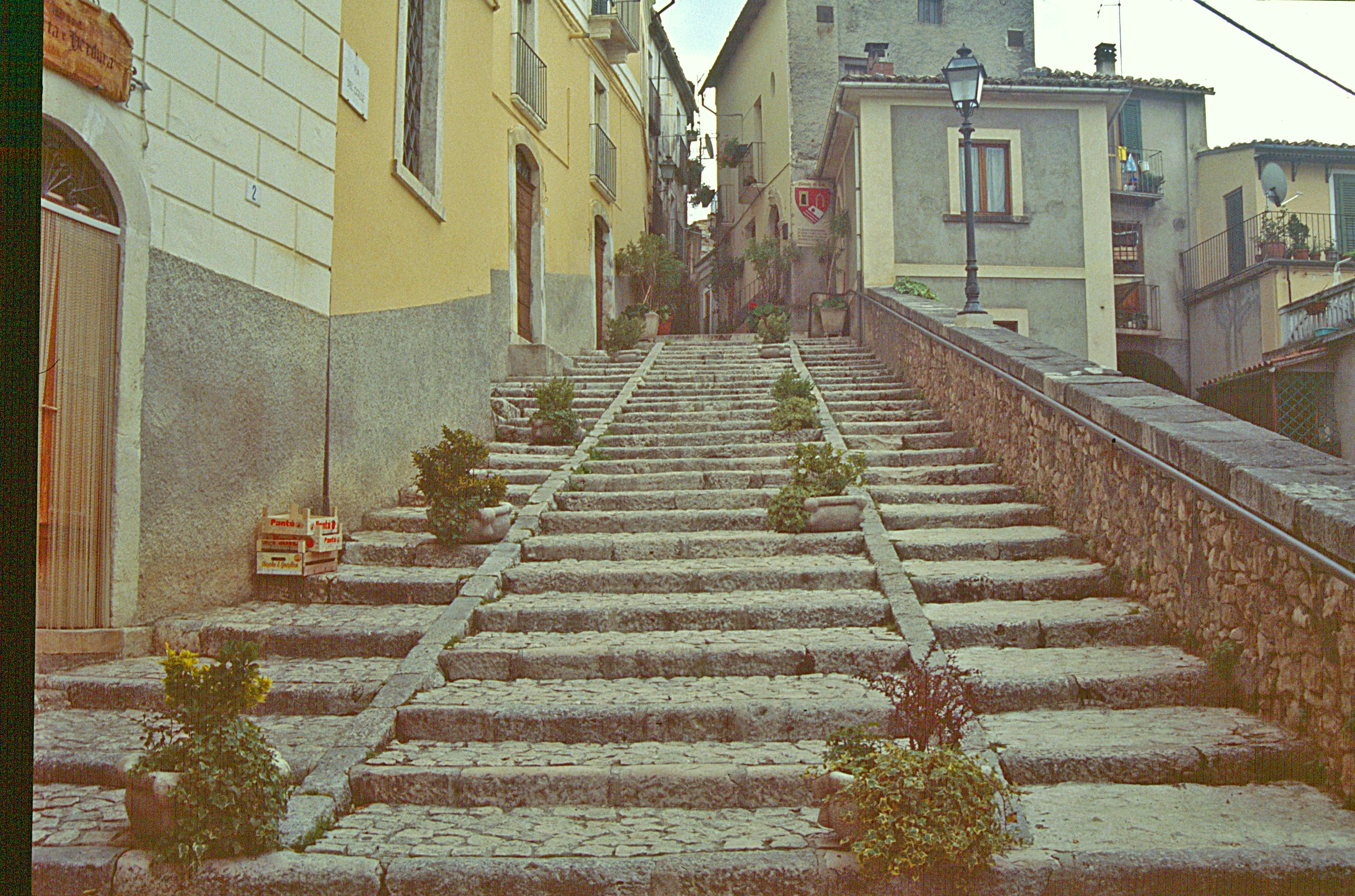 Pacentro